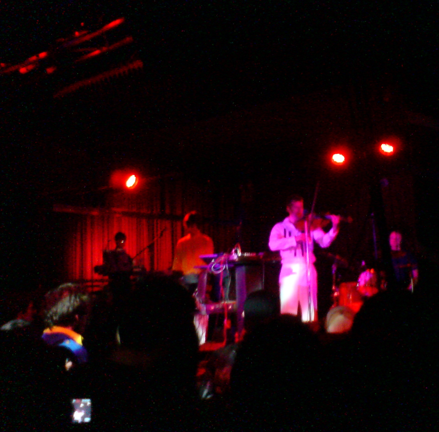 Kelley Polar